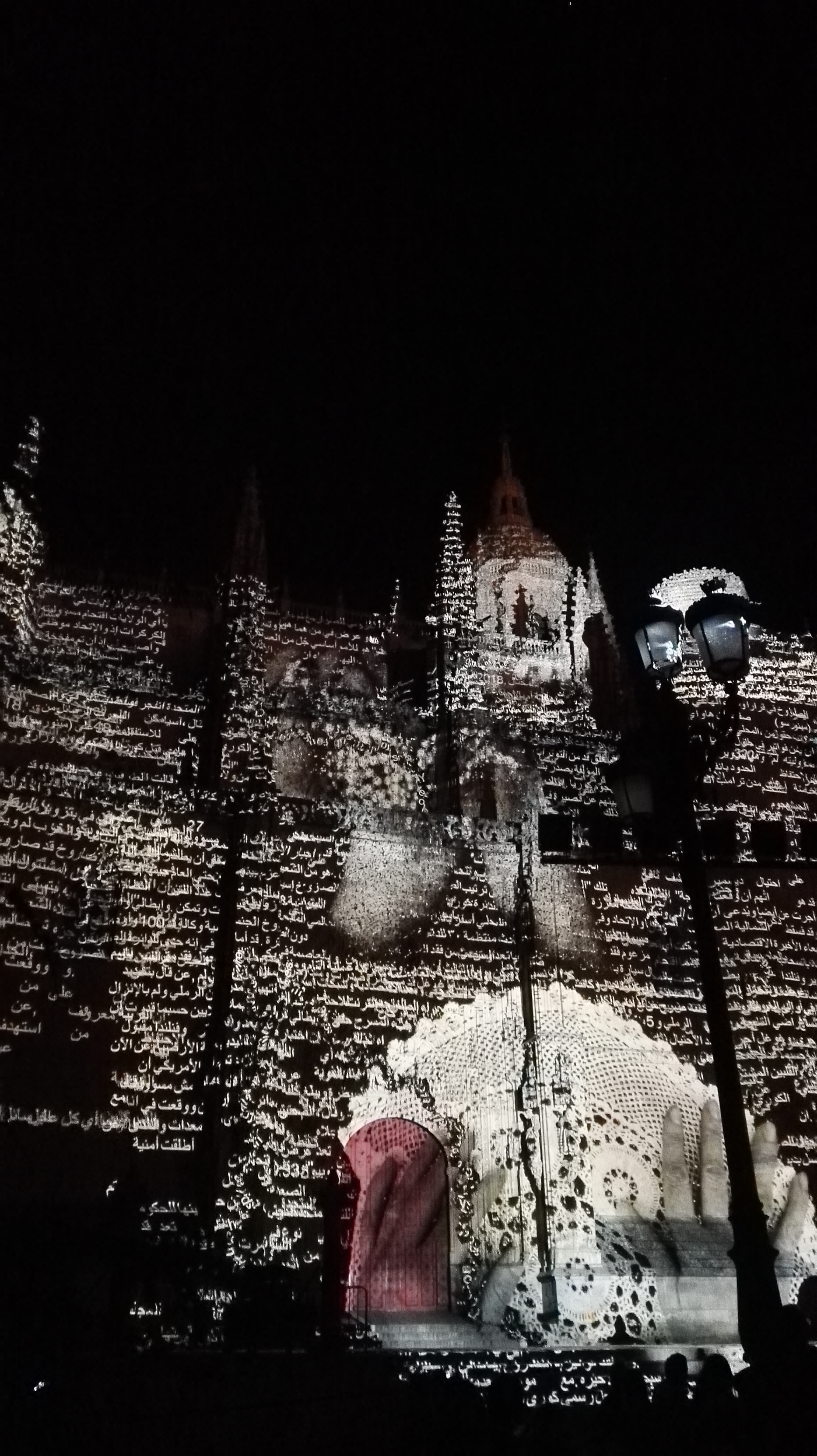 Charles Sandison: “Ouroboros” Catedral Nueva de Salamanca. III Edición Luz y Vanguardias 2018.